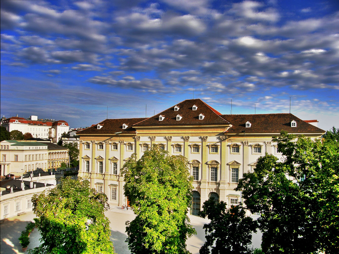 Gartenpalais, Fürstlich Liechtenstein'sches Palais